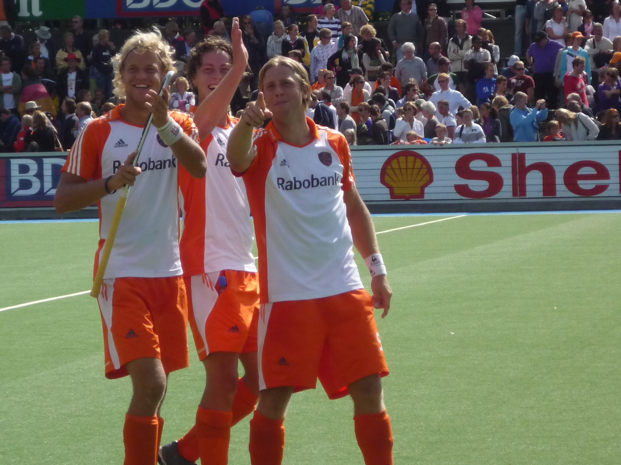 Roderick Weusthof tijdens EK hockey 2009 Wagener Stadion